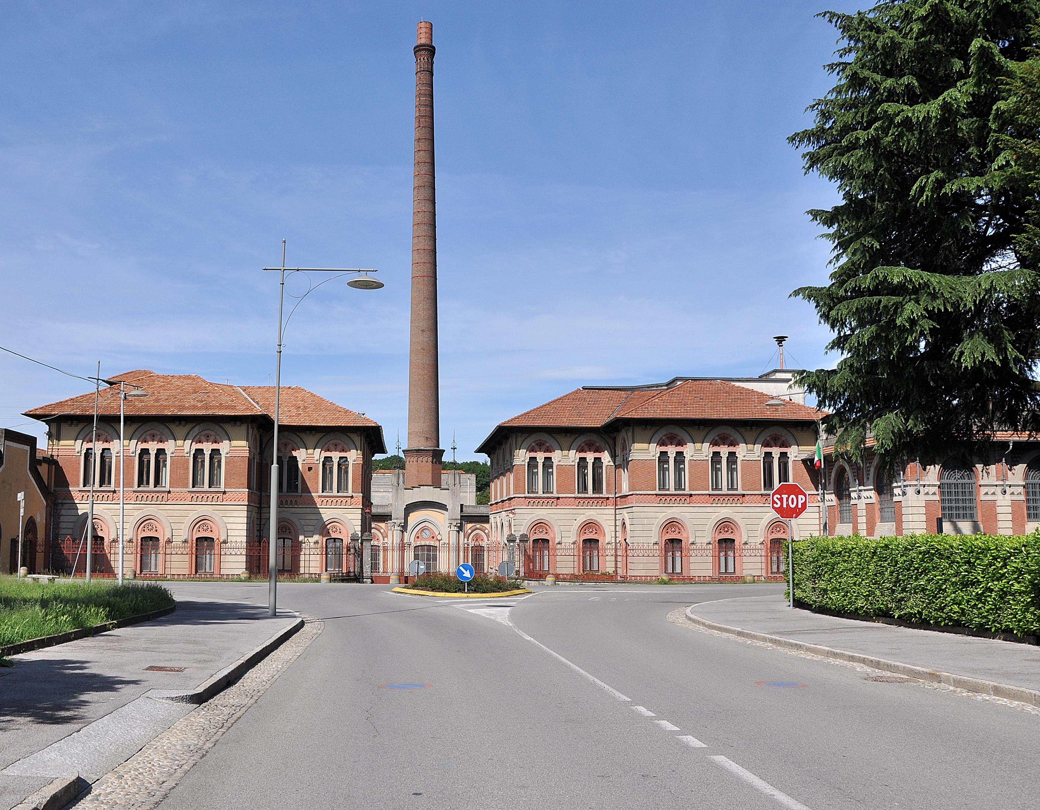 Ingresso principale: cancello d'accesso davanti alle palazzine dirigenziali e la ciminiera.